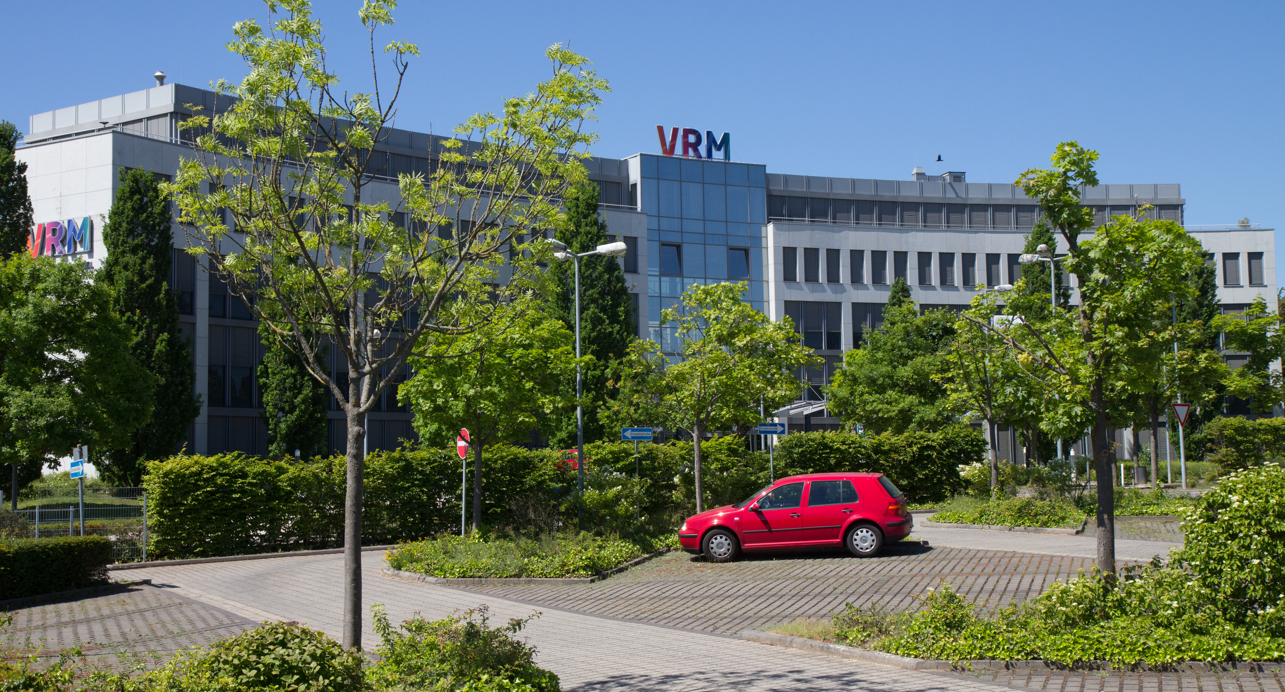 Hauptsitz der VRM (ehemals Verlagsgruppe Rhein Main) in Mainz